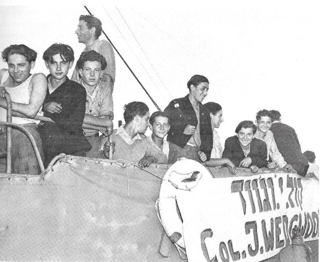 מעפילי וג'ווד מציגים את שם האונייה יאשיה וג'ווד בעת המפגש עם משחתות הצי הבריטי